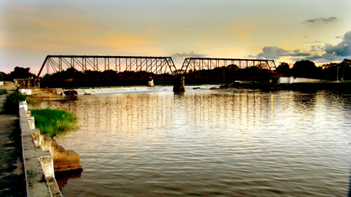 Granja - CE